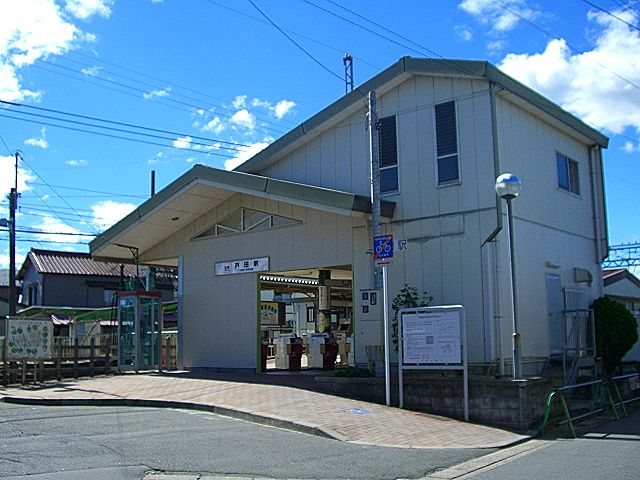 近鉄名古屋線･戸田駅 2006年10月7日（土）